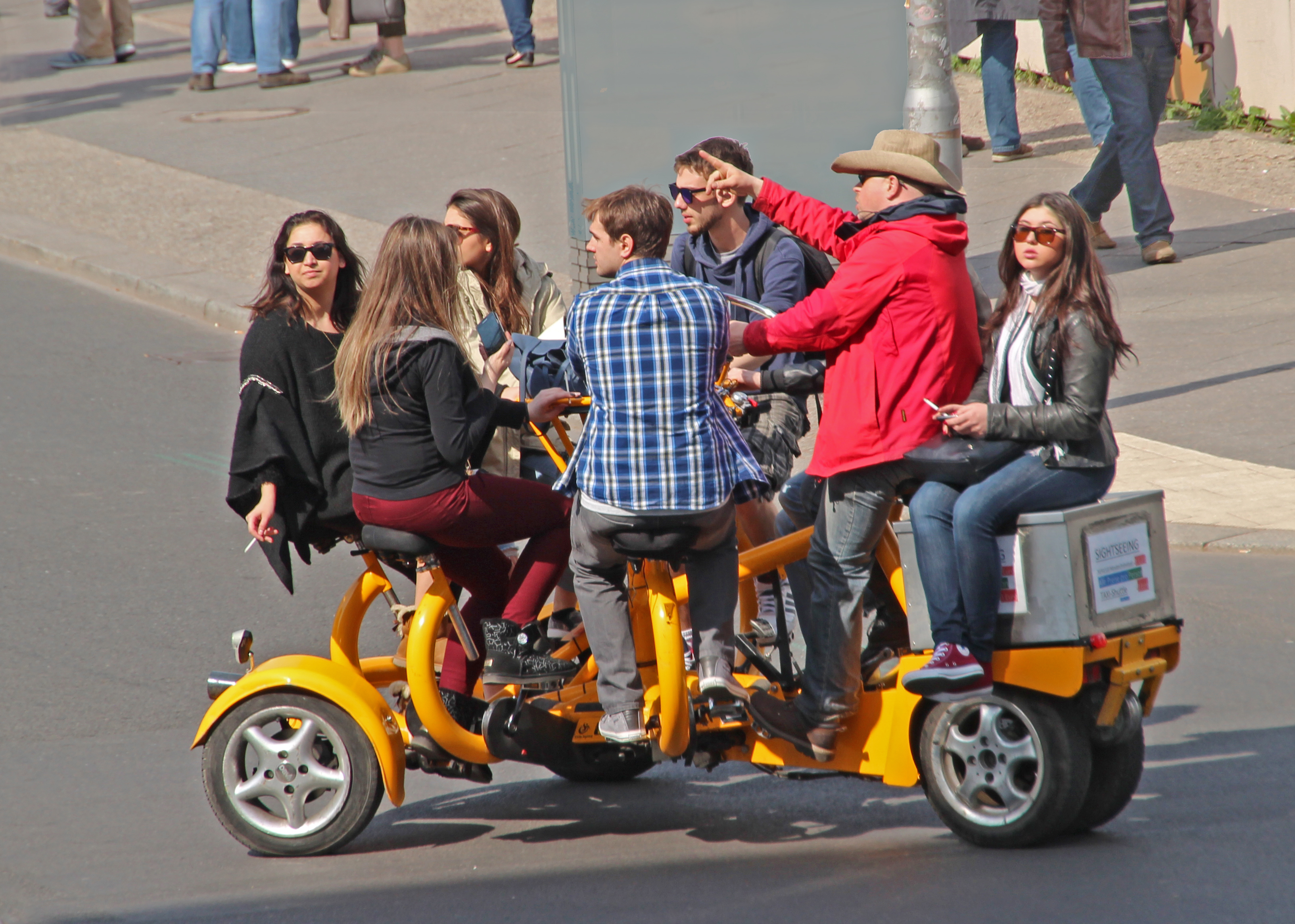 Bildinhalt: Ein gelbes ConferenceBike am Checkpoint Charly Aufnahmeort: Berlin, Deutschland